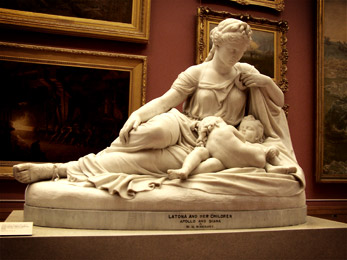 Argá to apógev̱ma